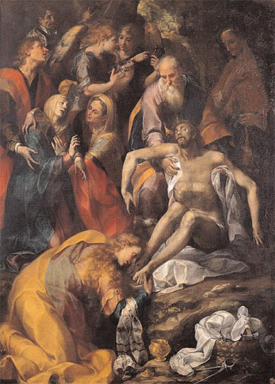 Pietá